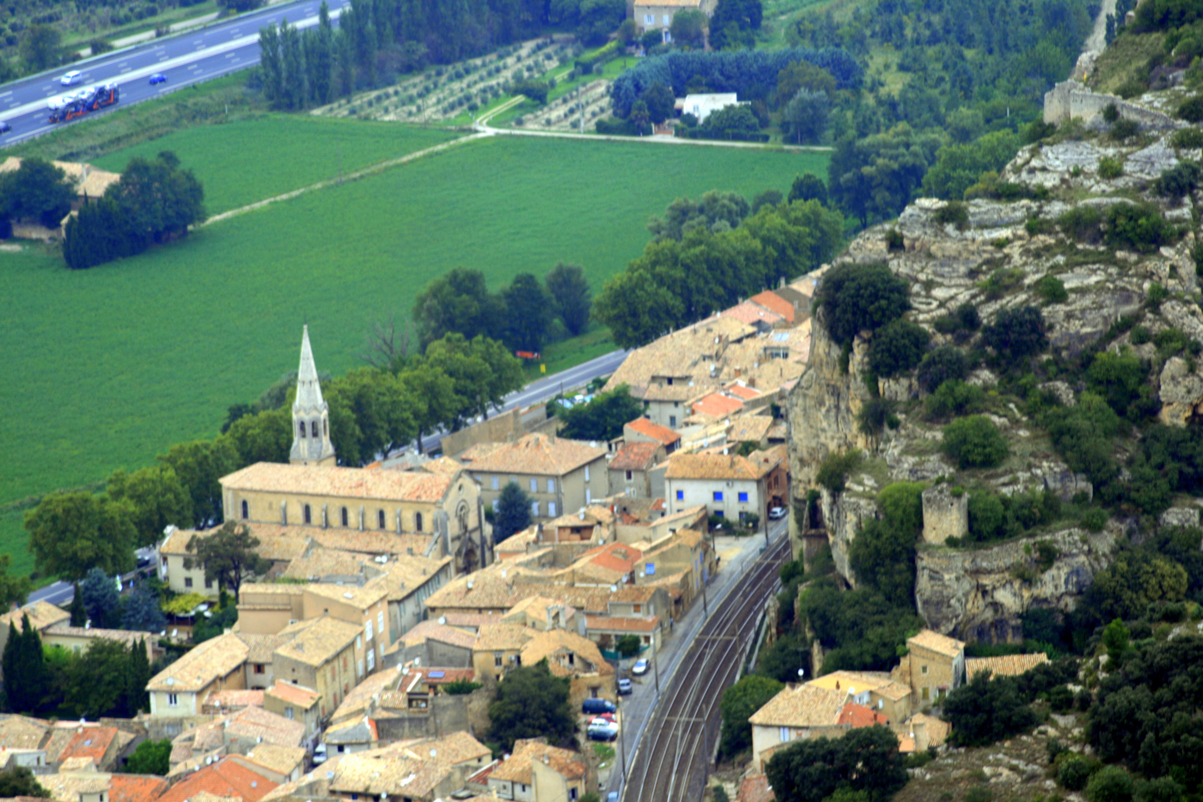 Vue sur le village de Mornas (Vaucluse).